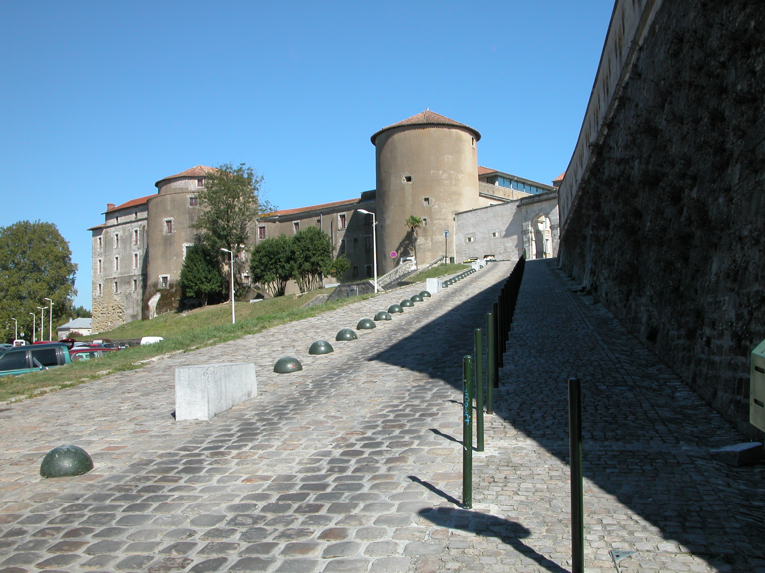 Chateau de Bayonne